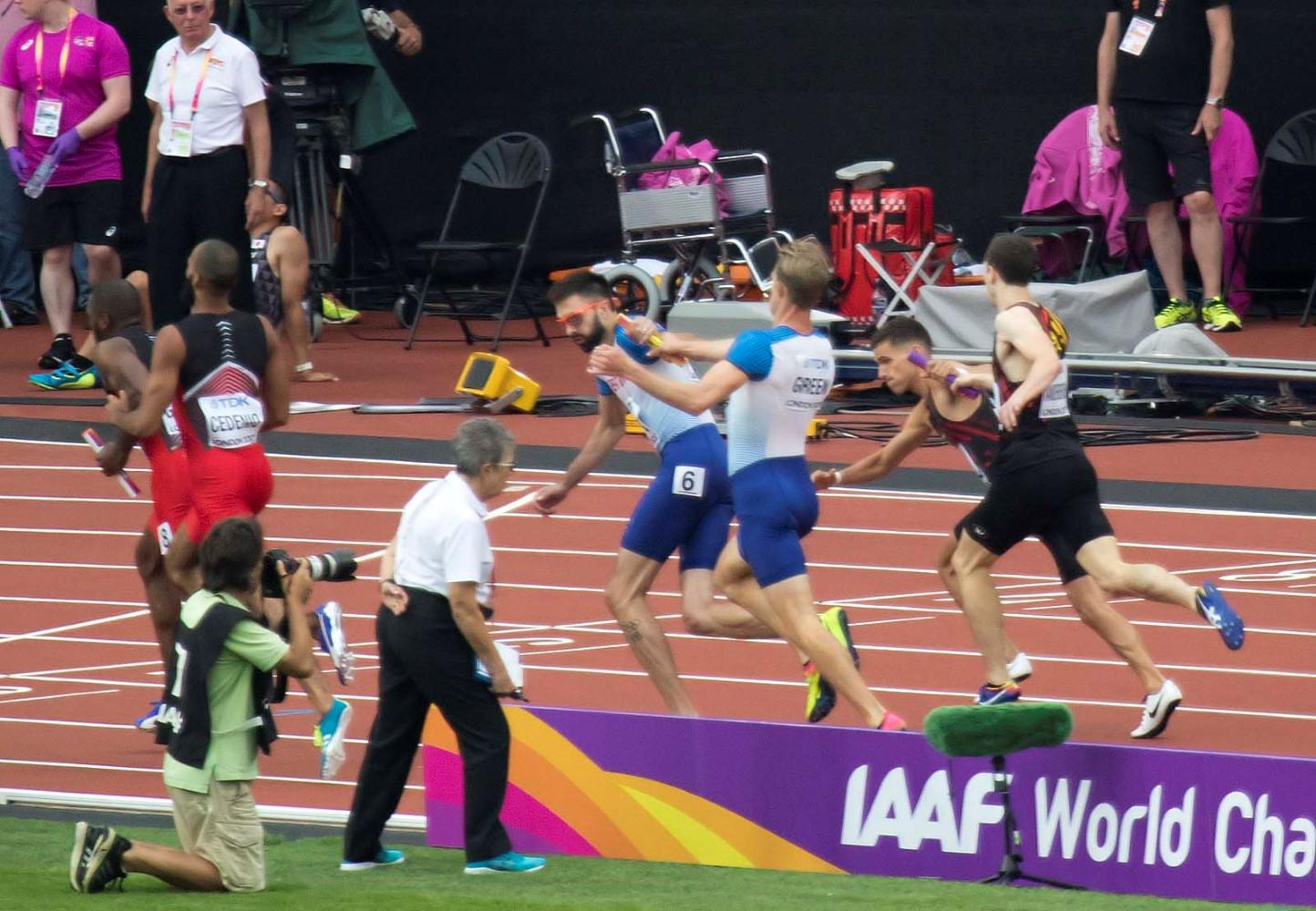 d8_14 4x400m reeksen mannen